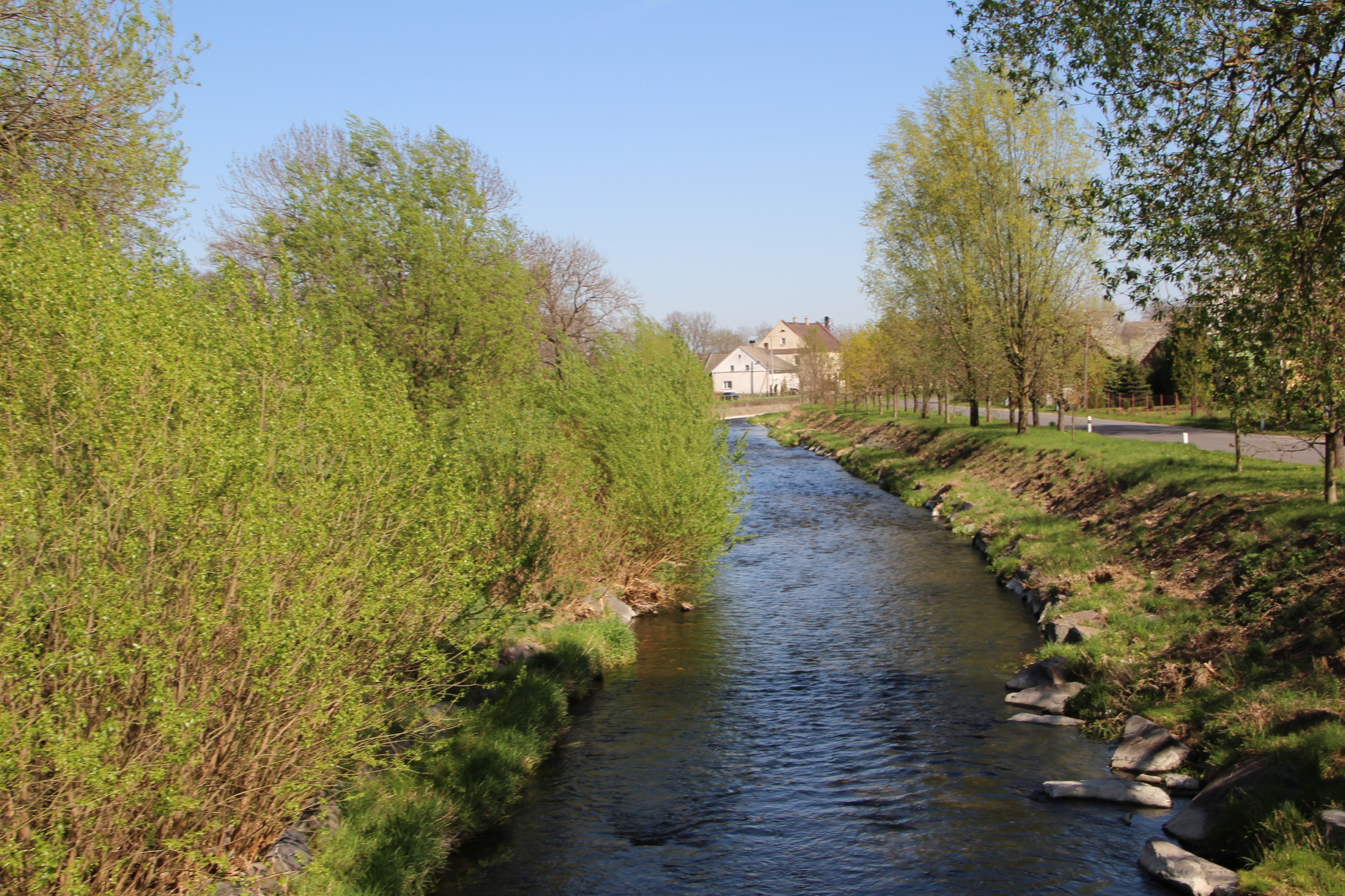 Chomiąża (niem. Komeise) – wieś w Polsce położona w województwie opolskim, w powiecie głubczyckim, w gminie Głubczyce, w gminie Głubczyce.